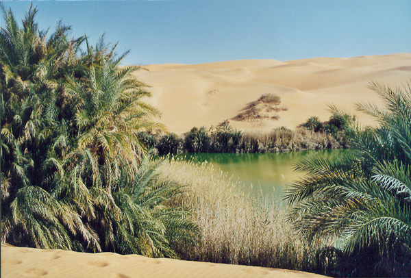 oase in libyen, mit Genehmigung der Fotografin unter GNU FDL veröffentlicht